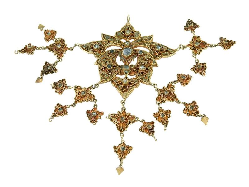 Haarsieraad. Dit haarsieraad wordt door bruiden en meisjes als onderdeel van de feestkleding links en rechts in het haar gedragen.. Gouden haarsieraad voor een bruid Unknown language: Ajeuem gumba